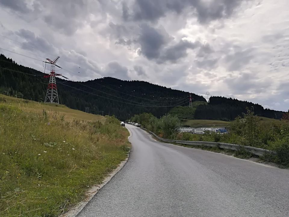 Vedenie VN pri Višňovom